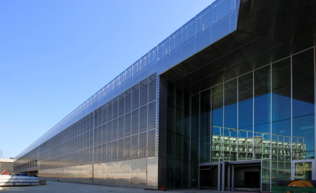 문화정보원 전경